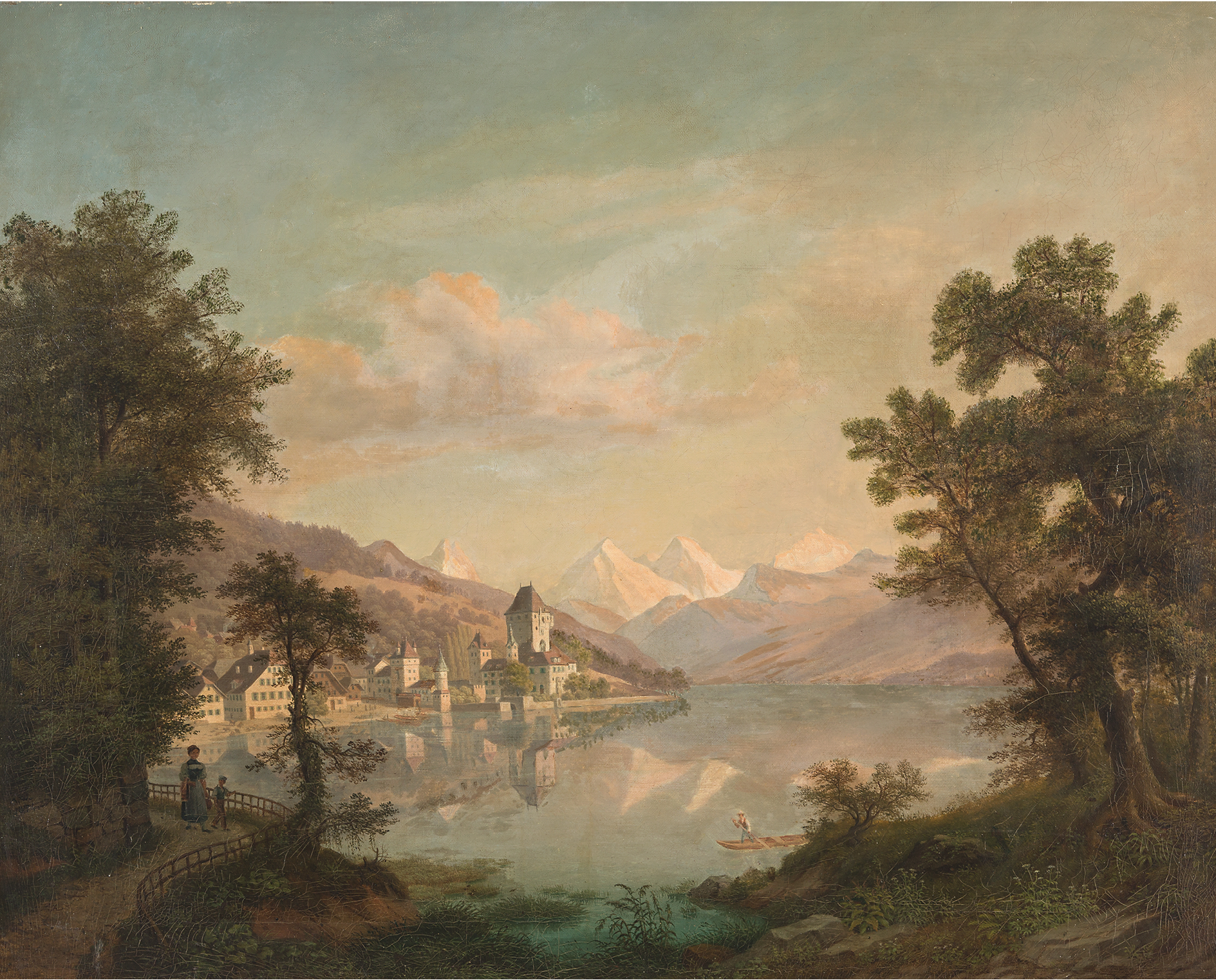 Stuker, Spring 2014, Nr. 2049